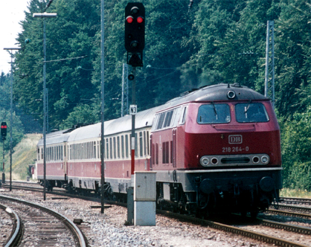 Der TEE 66 (Zürich Hbf - München Hbf) auf dem Abschnitt Lindau-München bei Geltendorf. Dieser Zug bestand aus deutschen TEE-Wagen, je einem Abteilwagen des Typs Avmz 111, einem Großraumwagen vom Typ Apmz 121 und ein SBB Speisewagen Typs WRm. Als Zuglokomotiven kamen zunächst eine Lok der Baureihe 218 der Deutschen Bundesbahn zum Einsatz (hier 218 264-0).